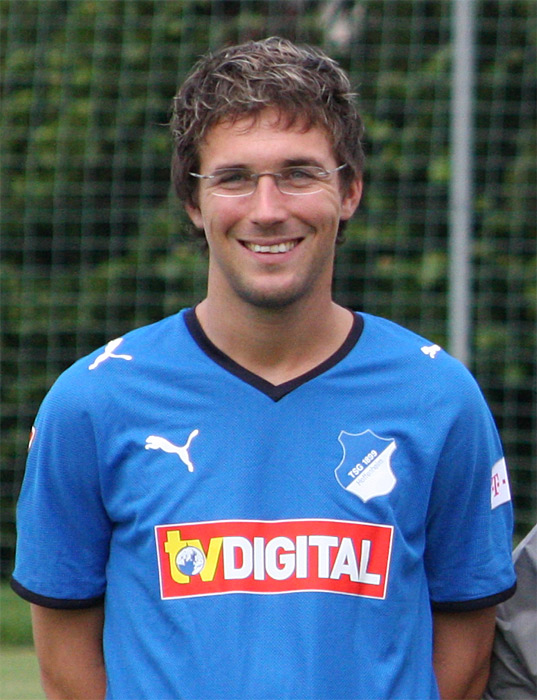 Trainingsauftakt 29.06.2009